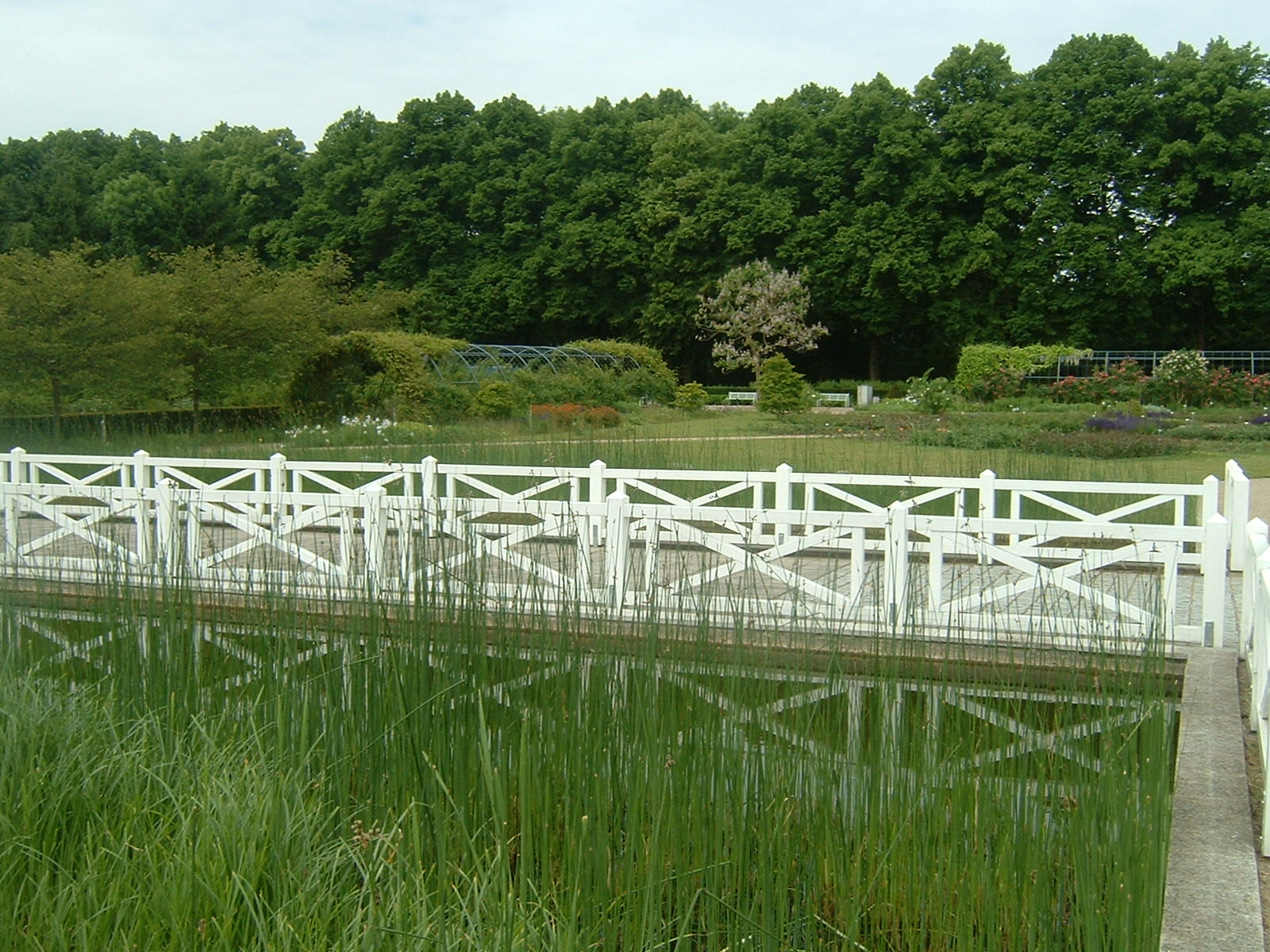 Rosarium in Hattersheim am Main in Hessen